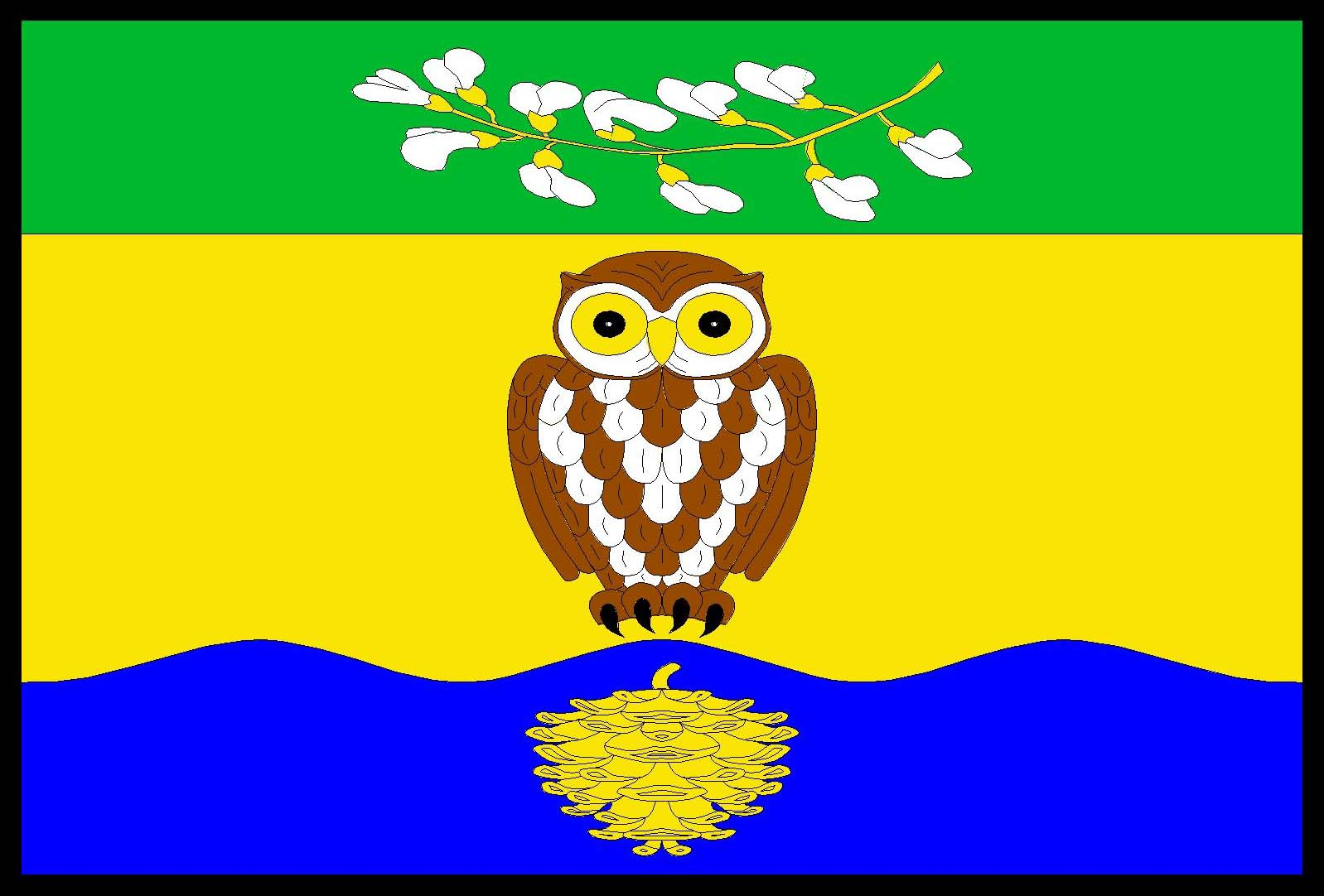 Vlajka obce Lhotky v okrese Mělník.